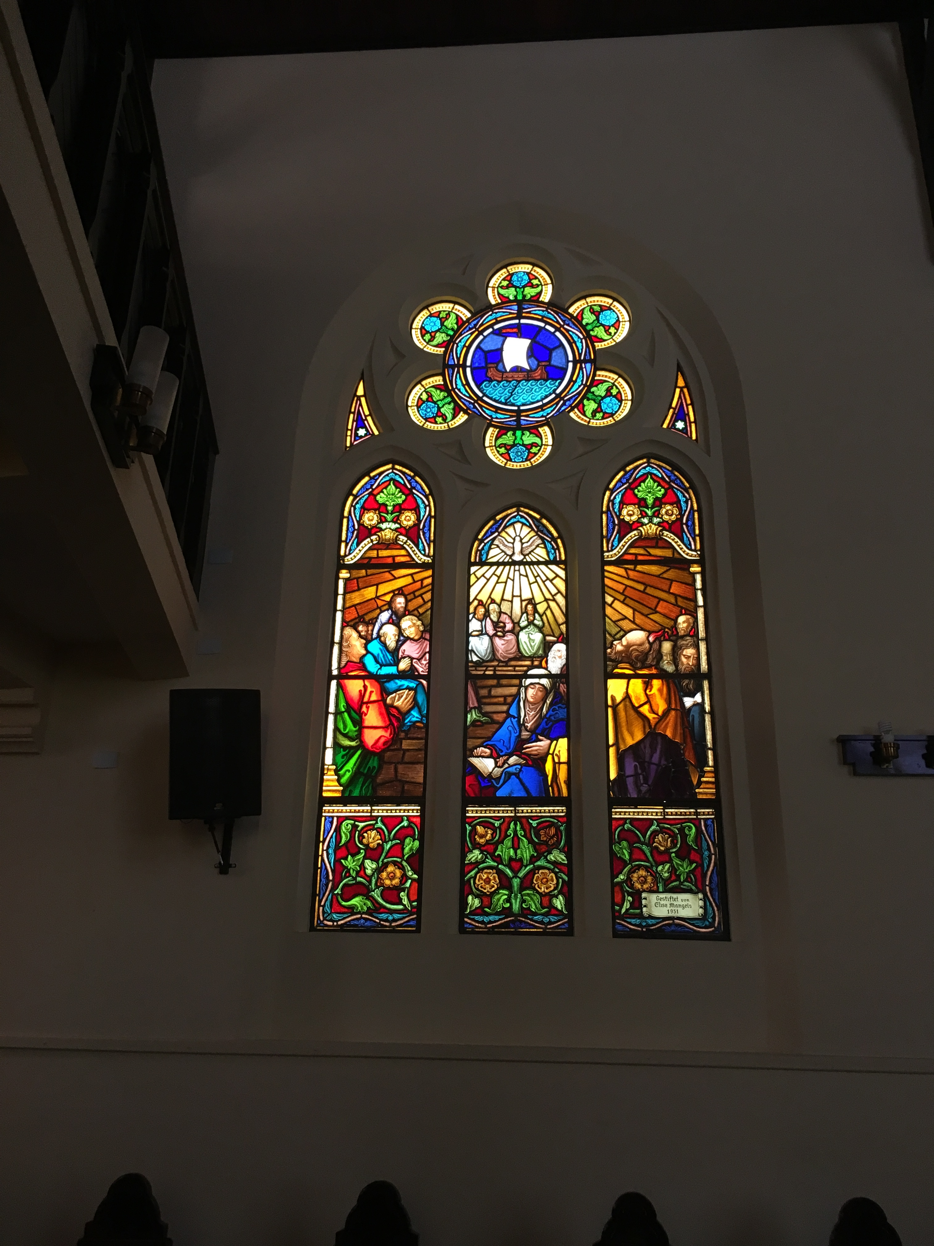 Vitral menor, instalado à esquerda do vitral principal da Igreja Luterana Martin Luther, no Largo do Paissandu (São Paulo-SP, Brasil), com a representação do nascimento de Jesus.